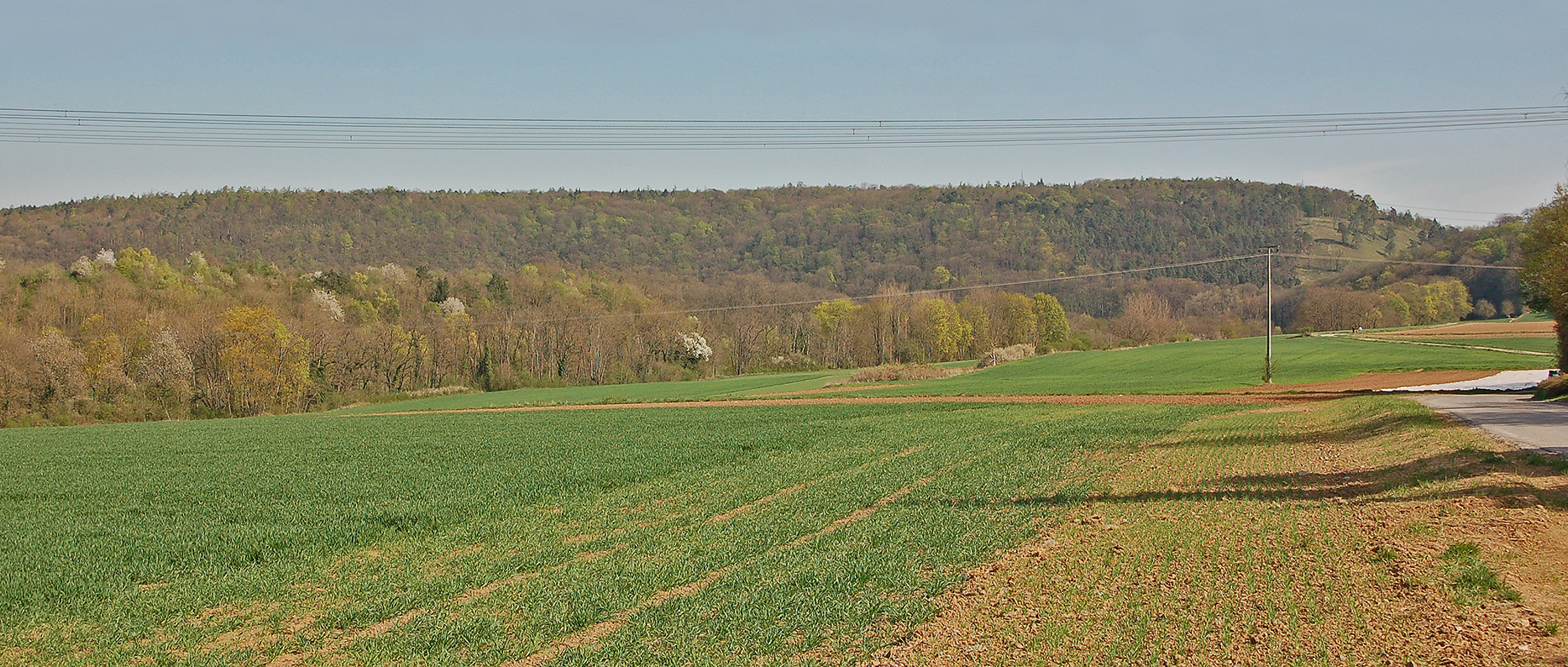 Bannwald Rotenacker über dem Remminger Enzknie. Blick vom Hohberg südl. von Unterriexingen